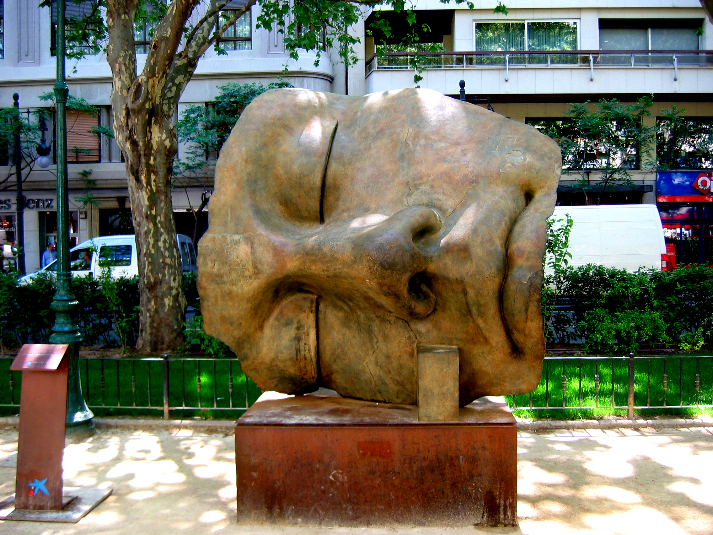 Estatua de Igor Mitoraj en Valencia, 2006